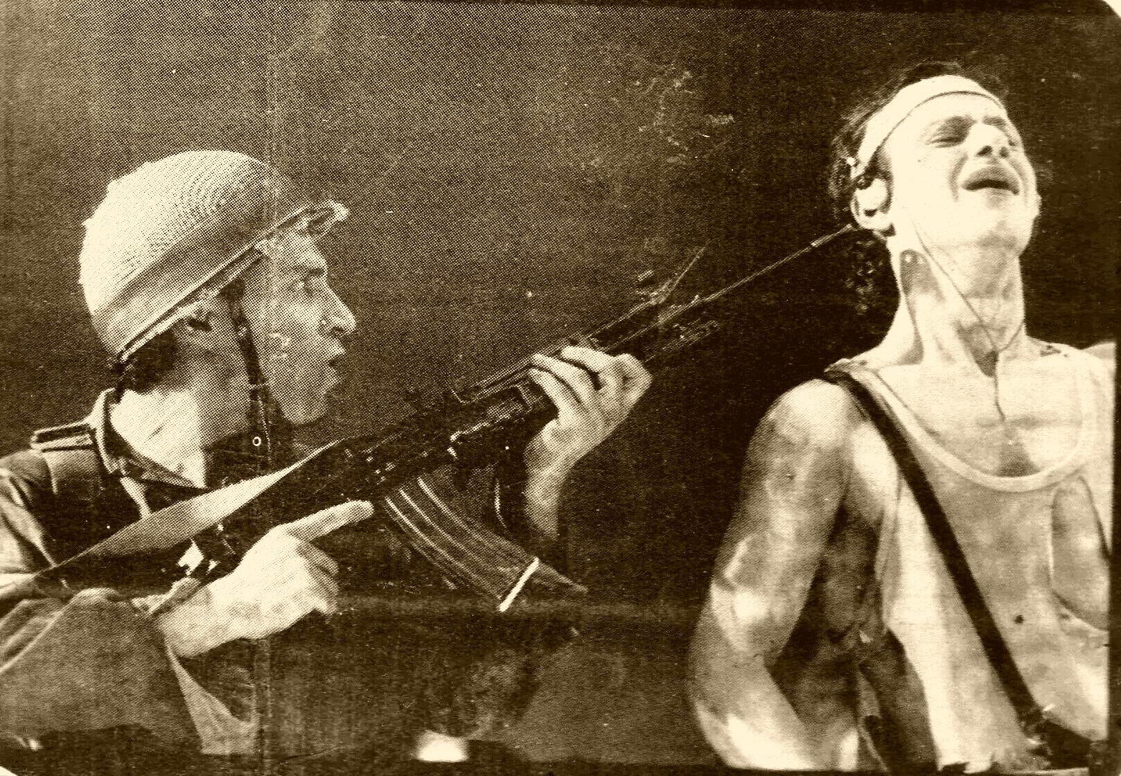 סינדרום ירושלים